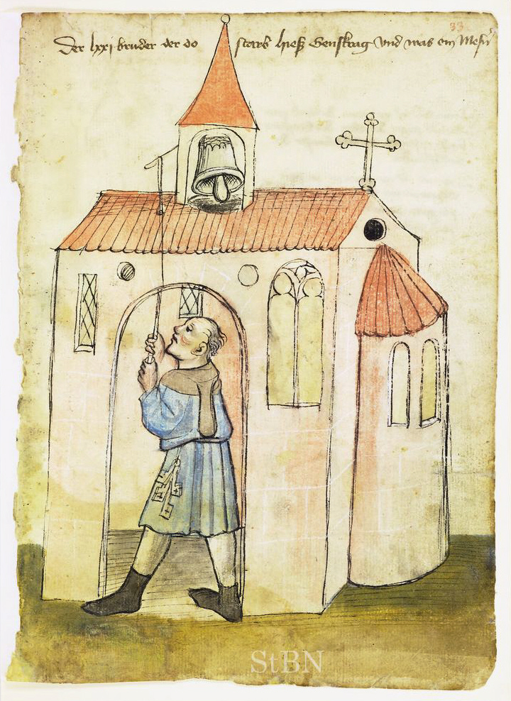 Genskrag (Gänsehals) N.N. , Mesn(er) (Mesner) Transkription und weitere Informationen